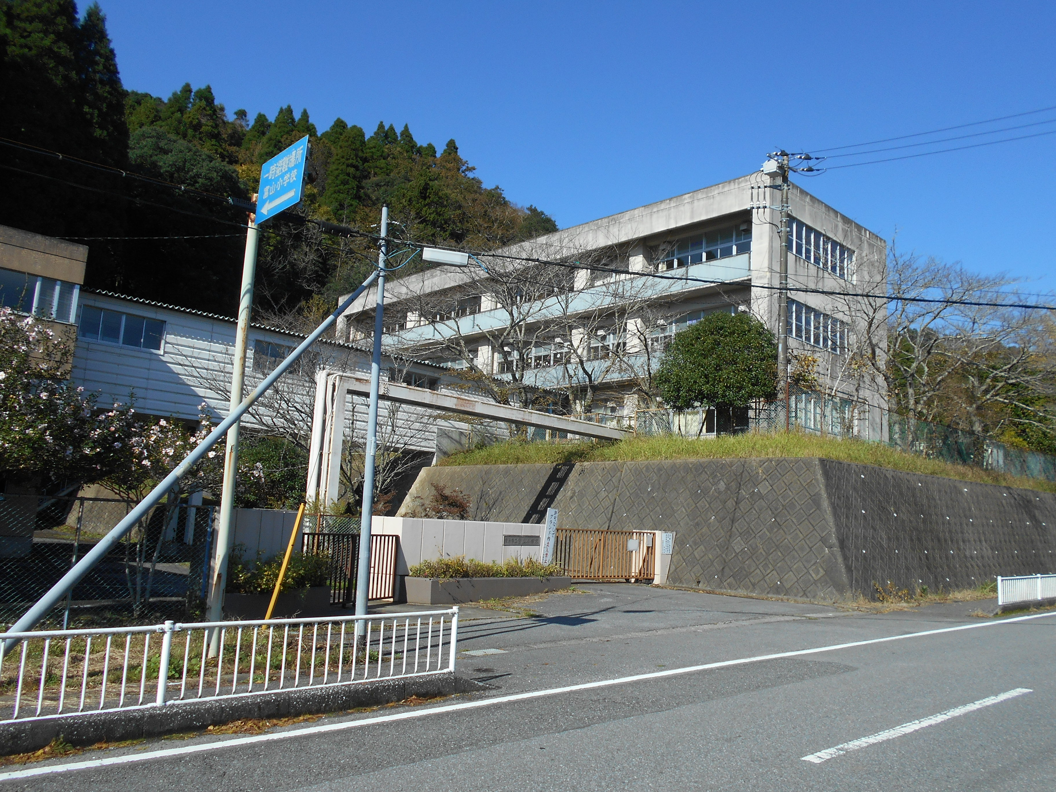 市原市立富山小学校